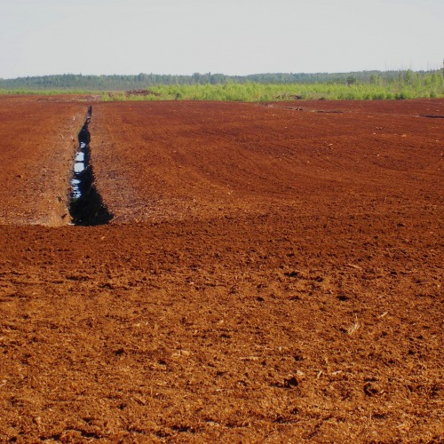 Гальский мох